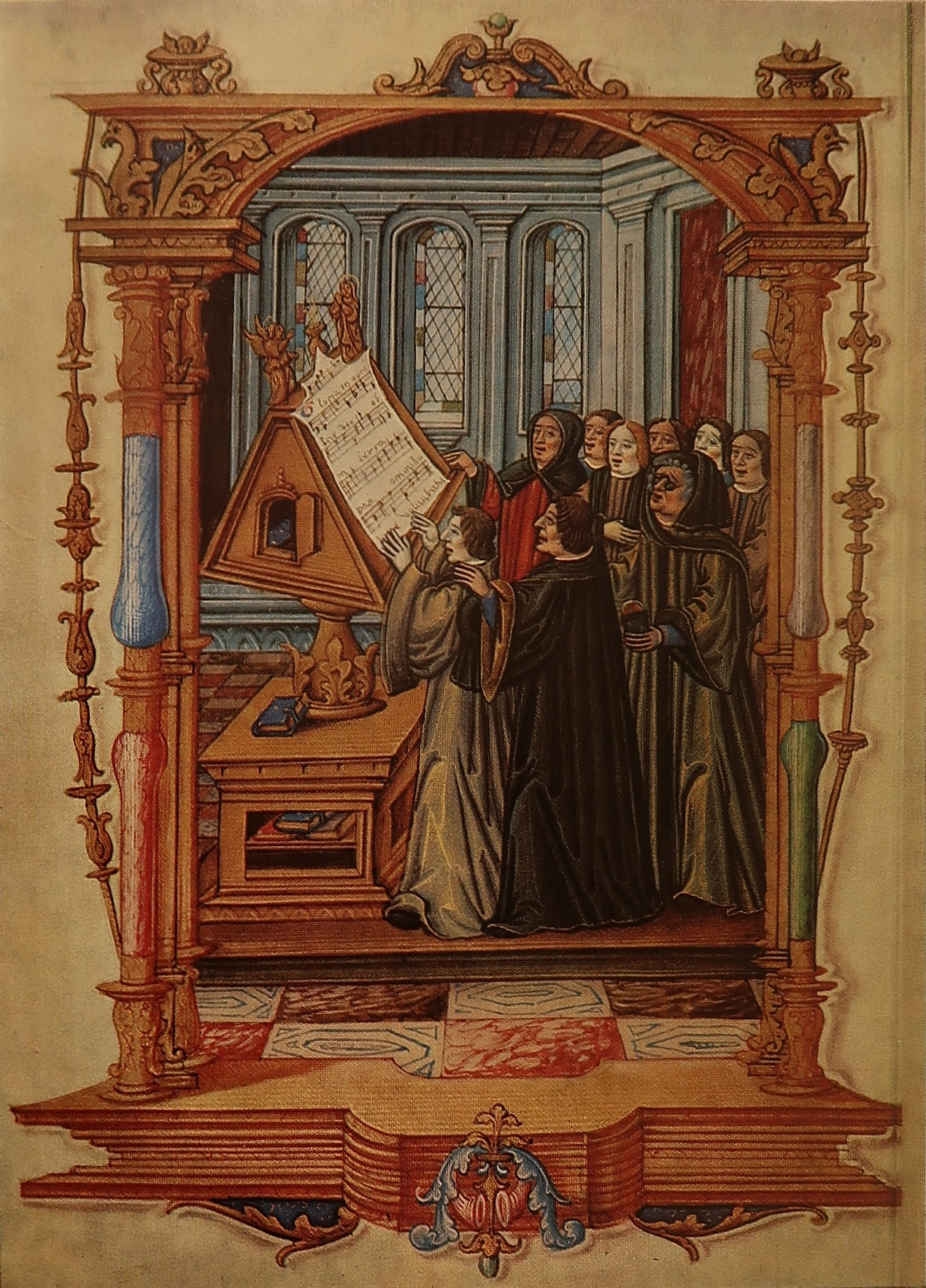 Ockeghem mit den Sängern der königlichen Kapelle, Miniatur des Jahres 1523, im Manuskript eines preisgekrönten Gedichts (Ms. fr.1537 fol. 58v der Bibliothèque Nationale, Paris).